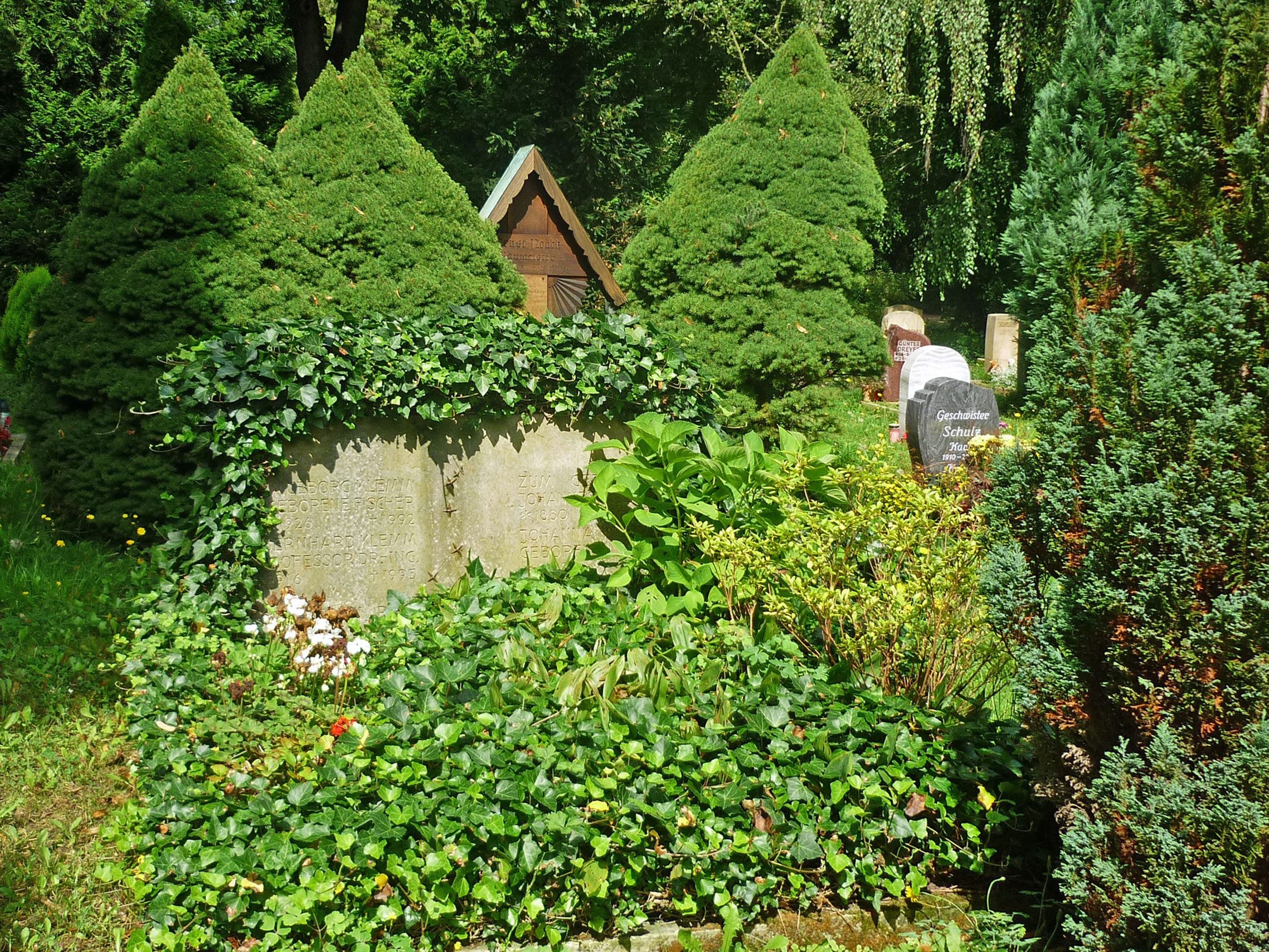 Grabstätte von Prof. Dr.-Ing. Bernhard Klemm (1916–1995) auf dem Äußeren Plauenschen Friedhof in Dresden-Plauen